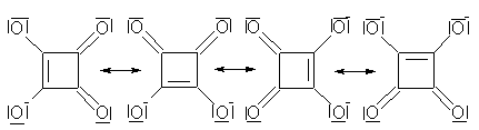 Quadratsäuredianion